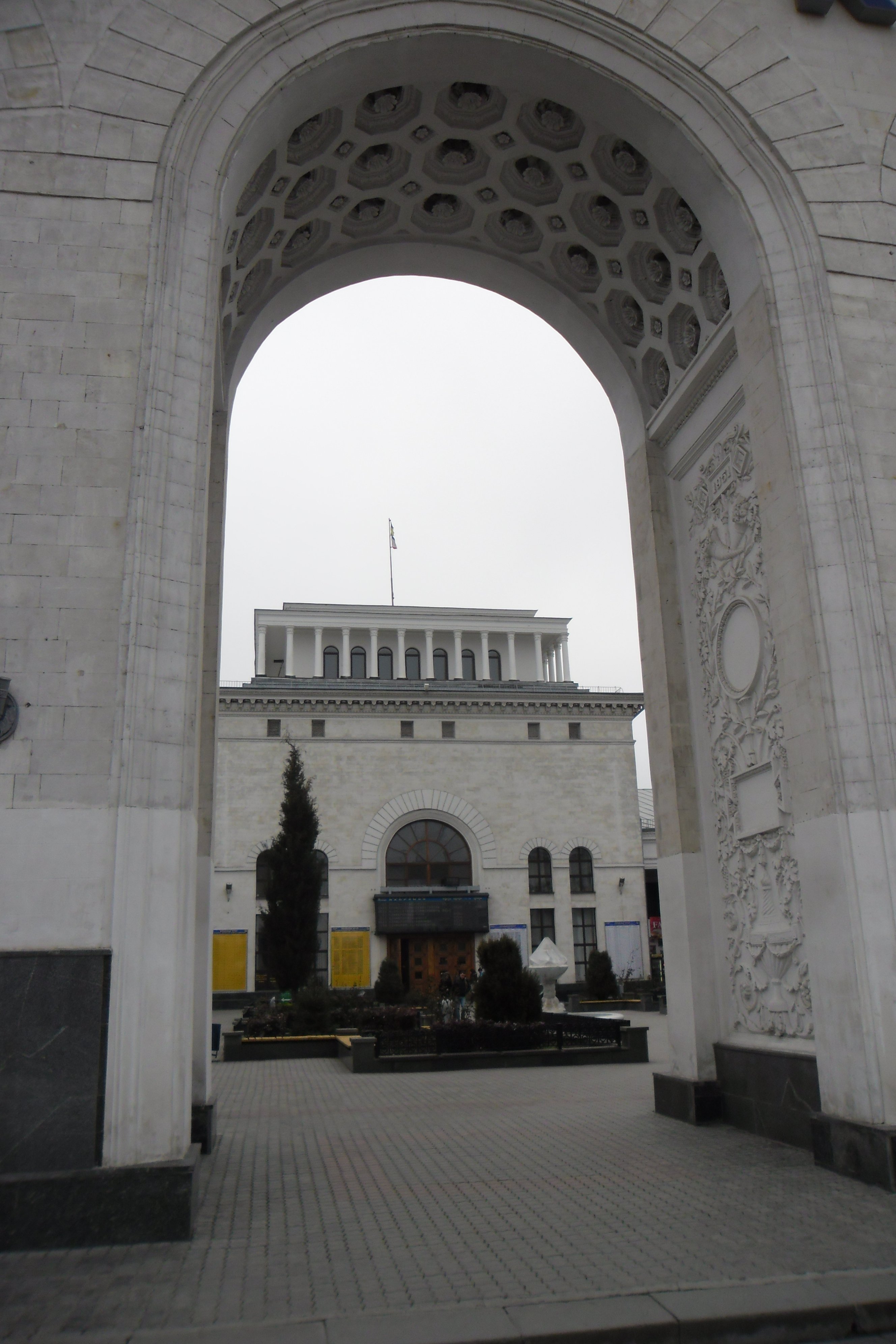 Фото